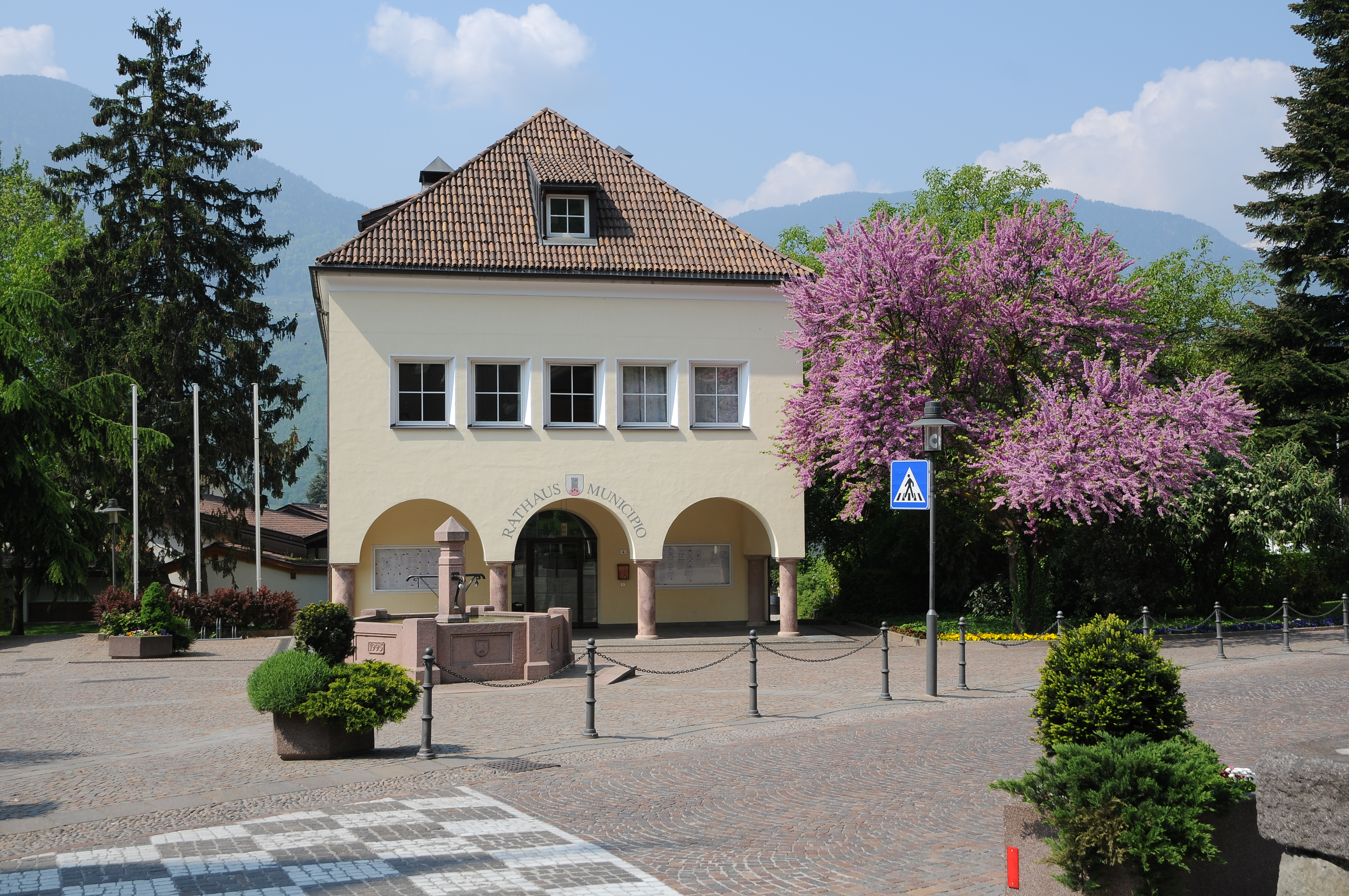 Das Rathaus in Gargazon.